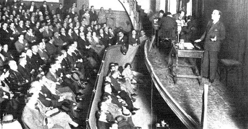 Fotografía del discurso de Ortega y Gasset del 6 de diciembre de 1931, conocido como "Rectificación de la República", publicada en la revista Mundo Gráfico